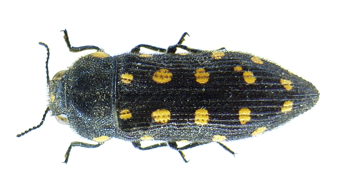 Acmaeodera degener